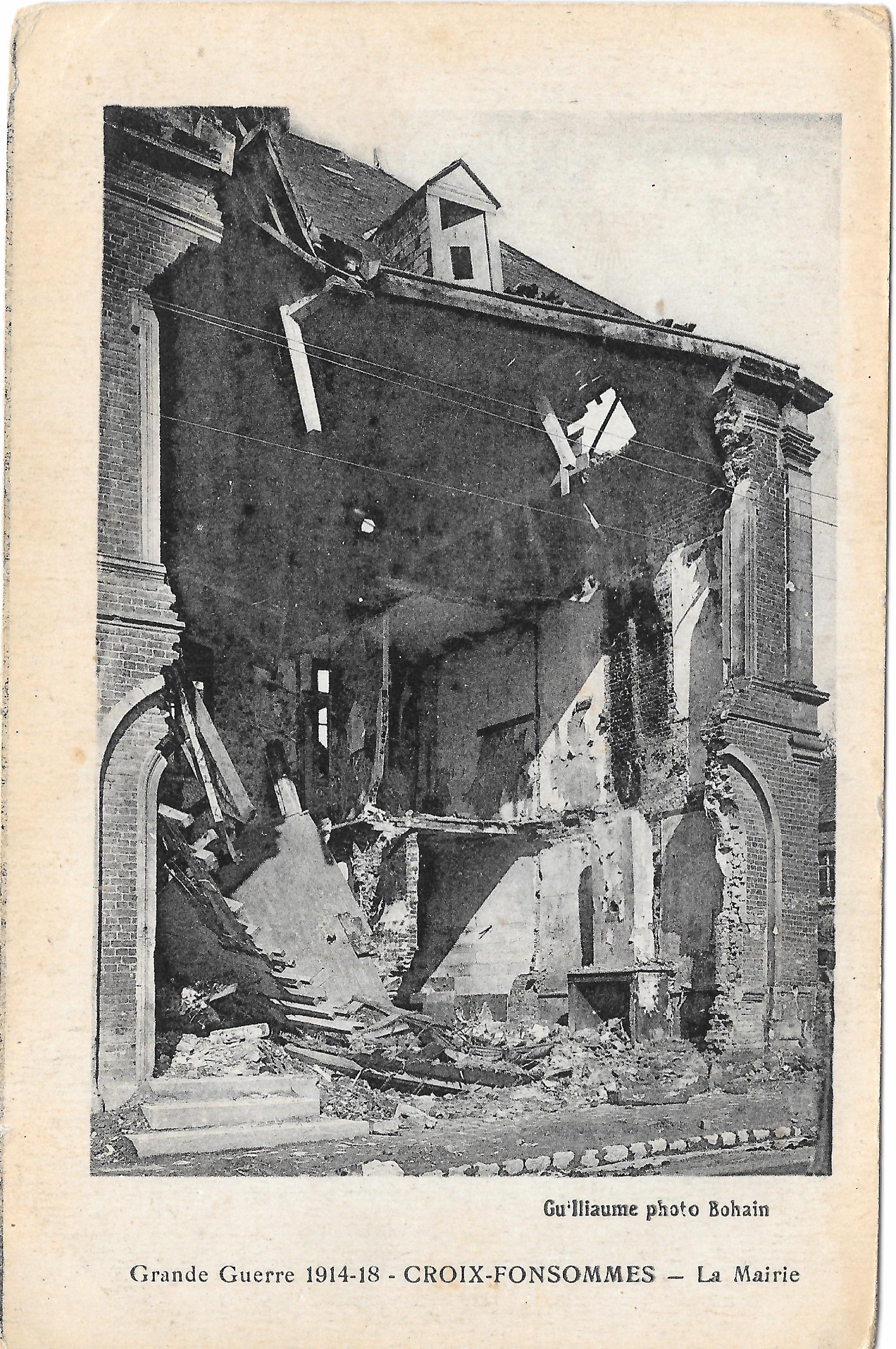 La mairie détruite en 1918.